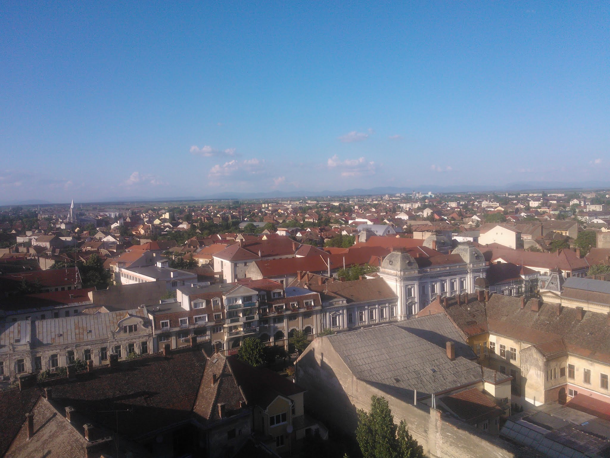 Szatmárnémeti 2013